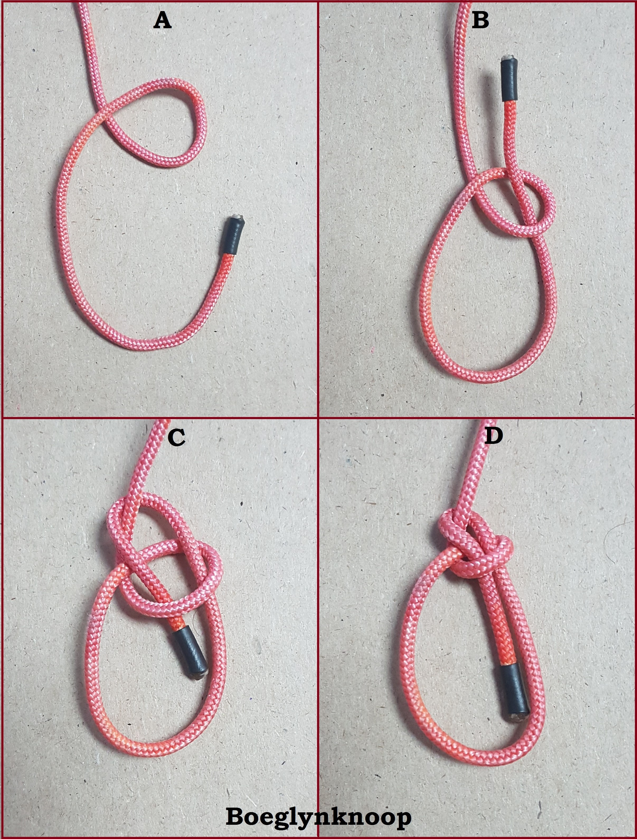 Metode om Boeglynknoop te knoop.